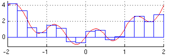 Numerical integration